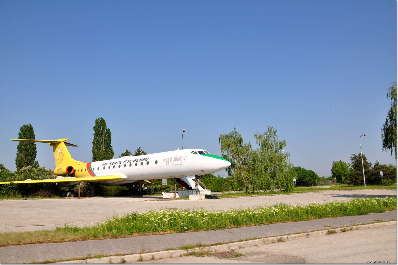 Tu-134A bývalý OK-AFB ČSA na letisku v Piešťanoch